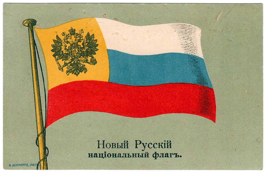 Новый Русский национальный флаг. Открытка времён войны 1914 года.